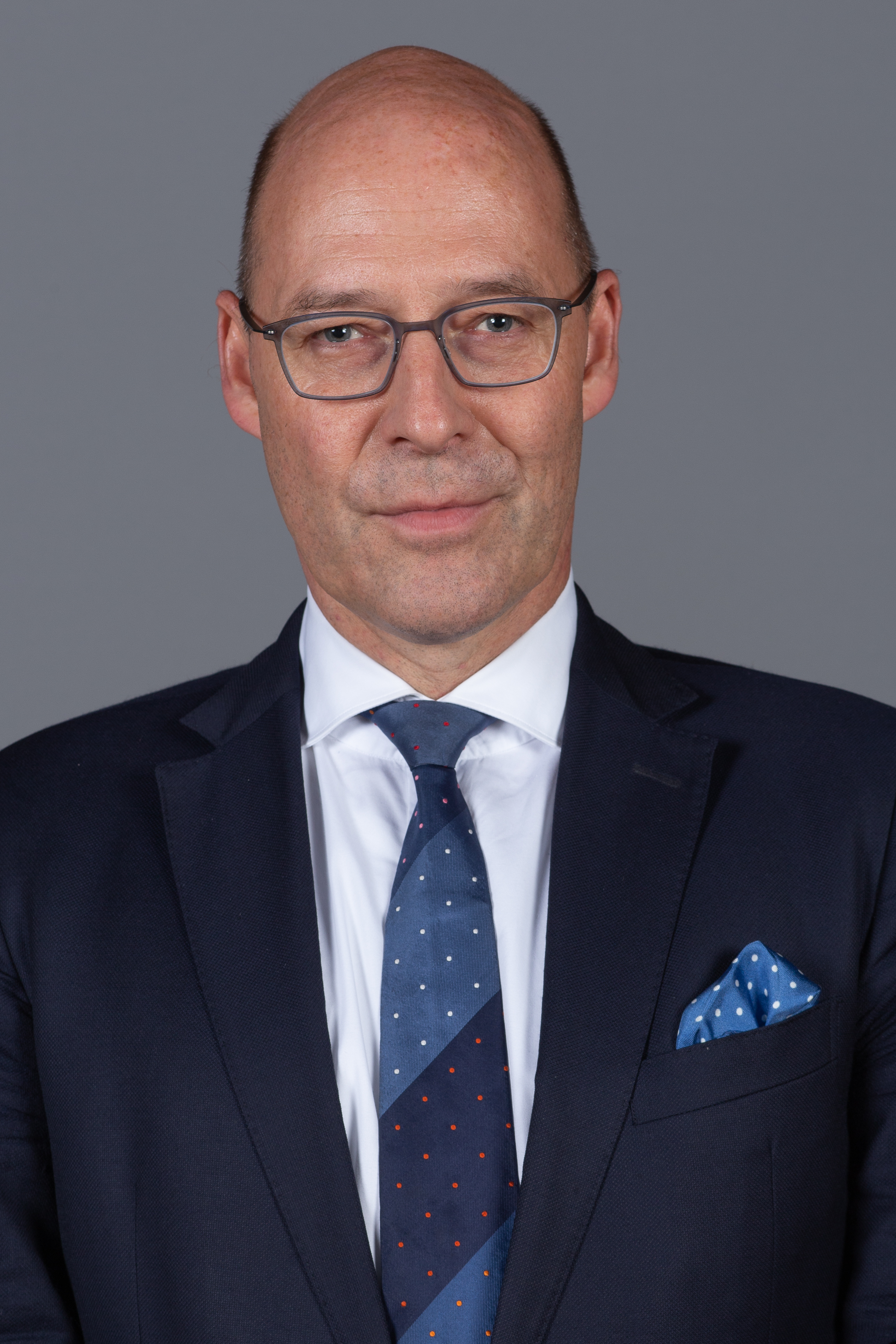 Abgeordnete(r) der Bürgerschaft der Freien und Hansestadt Hamburg Alexander Wolf